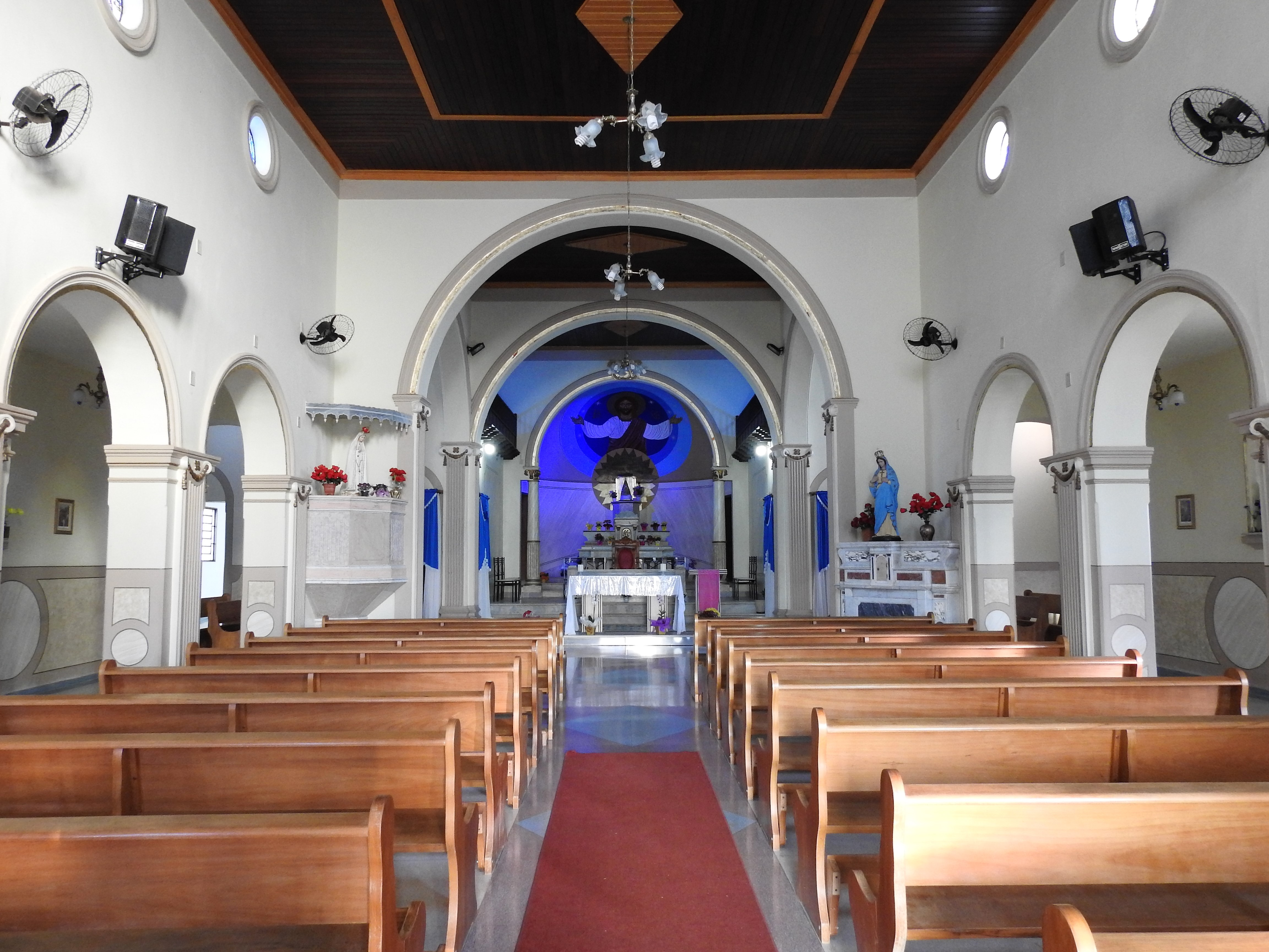 Santuário Nossa Senhora Aparecida da Babilônia ou Aparecida da Babilônia e também Aparecidinha, está localizado no município de São Carlos, na Estrada Municipal Leôncio Zambel, com acesso pela Rodovia Dr. Paulo Lauro (SP-215) no km 136 e pertence à Paróquia Santa Isabel. O Santuário possui, uma Capela, sala de milagres, espaço para eventos e centro de convenções, está subordinado à paróquia de Santa Isabel.